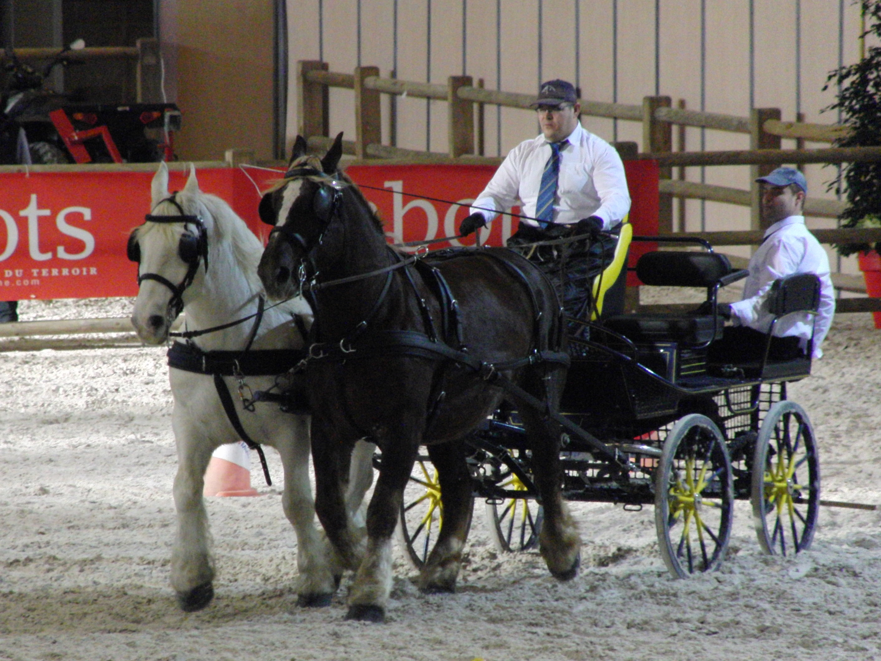 Attelage de chevaux Boulonnais lors de la Paris Cup de Traction Animale (épreuve de Maniabilité), Salon du cheval de Paris 2014, Parc des expositions de Paris-Nord Villepinte, France